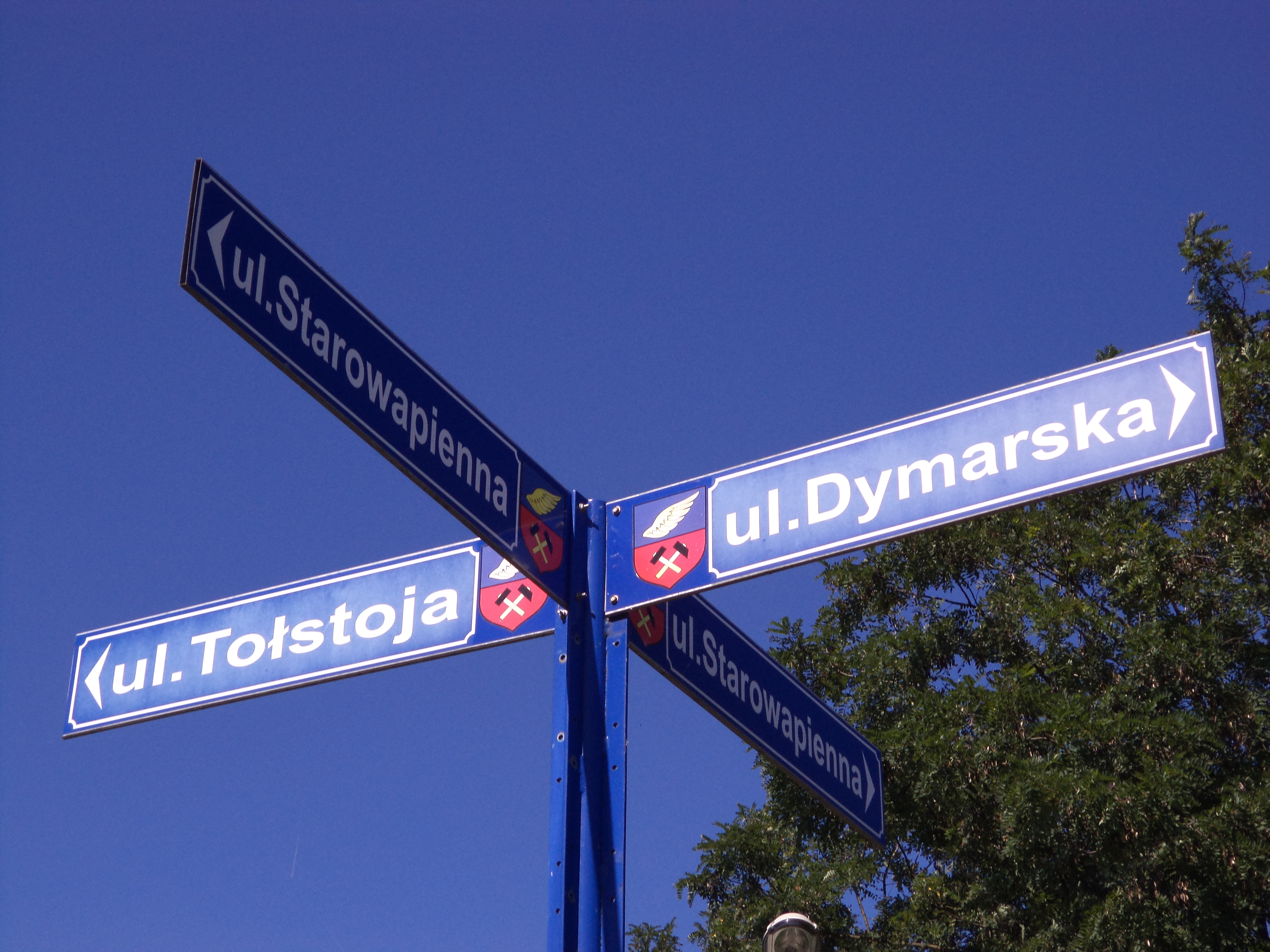 Dawny herb Tarnowskich Gór widoczny na tablicach z nazwą ulic na terenie Rybnej